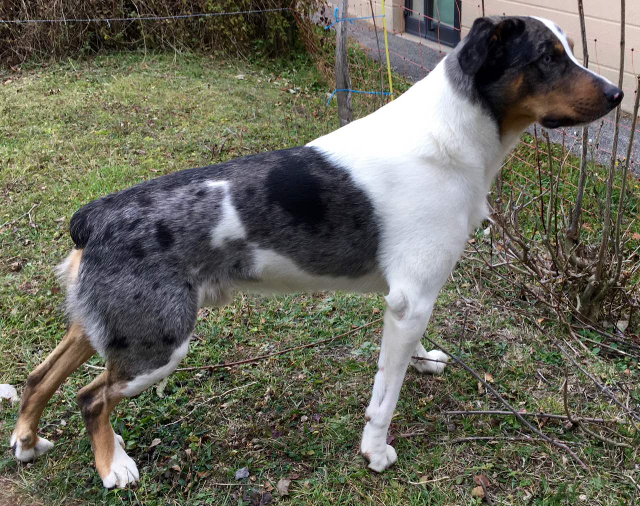 Berger de Savoie Arlequin